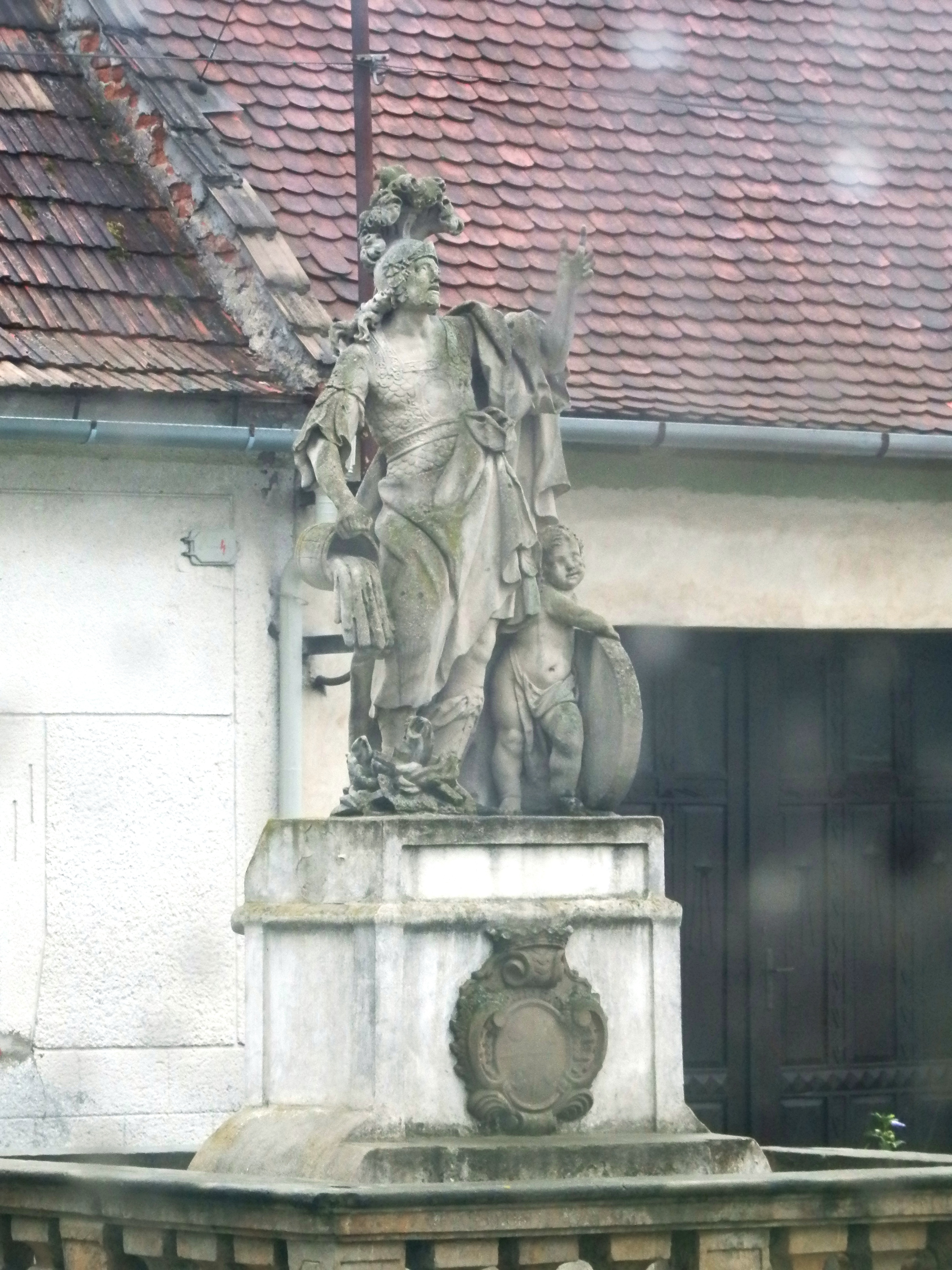 Socha sv. Floriána (Oplocany), náves, Oplocany